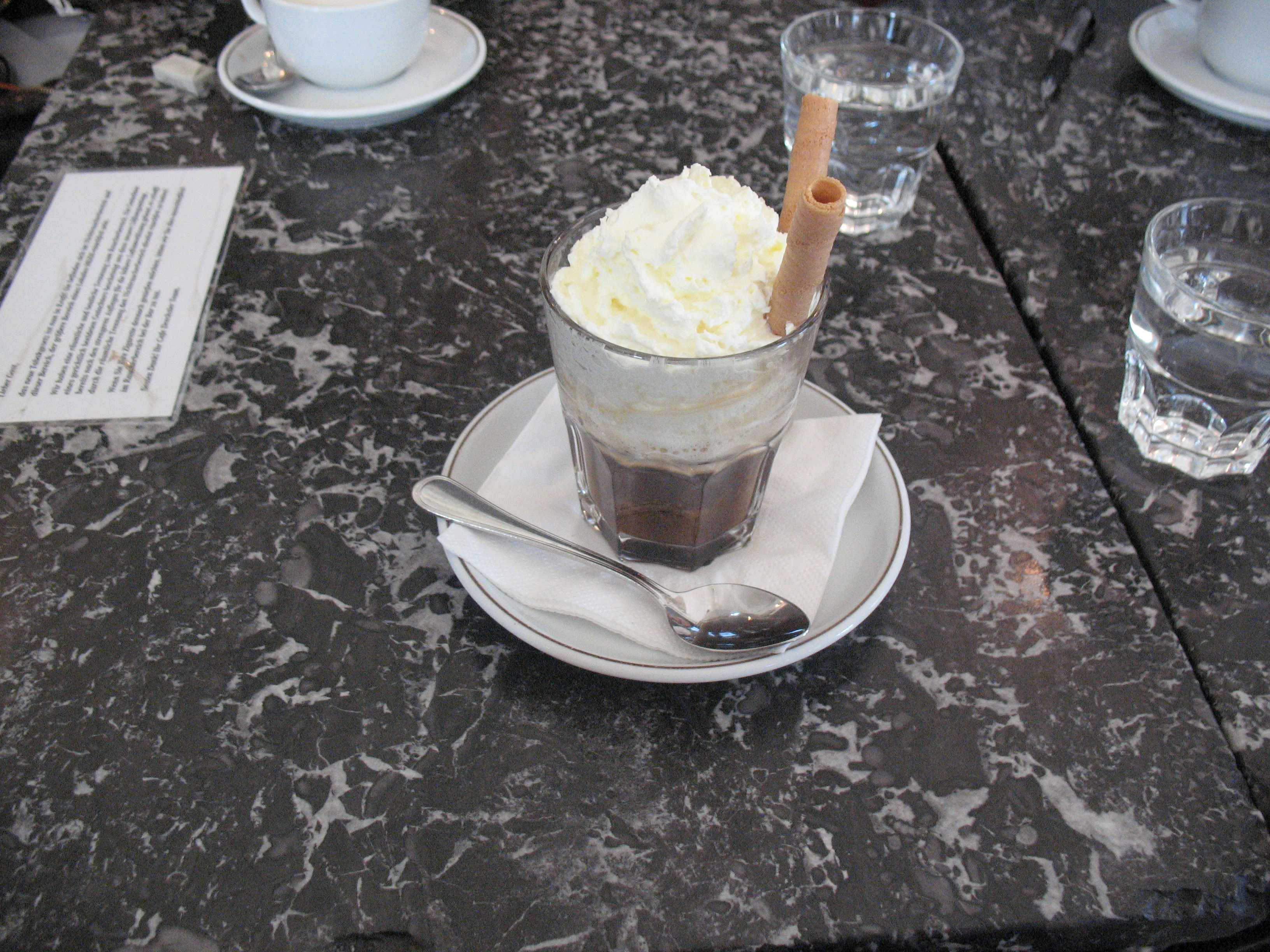 Cafe Drechsler, Wien.